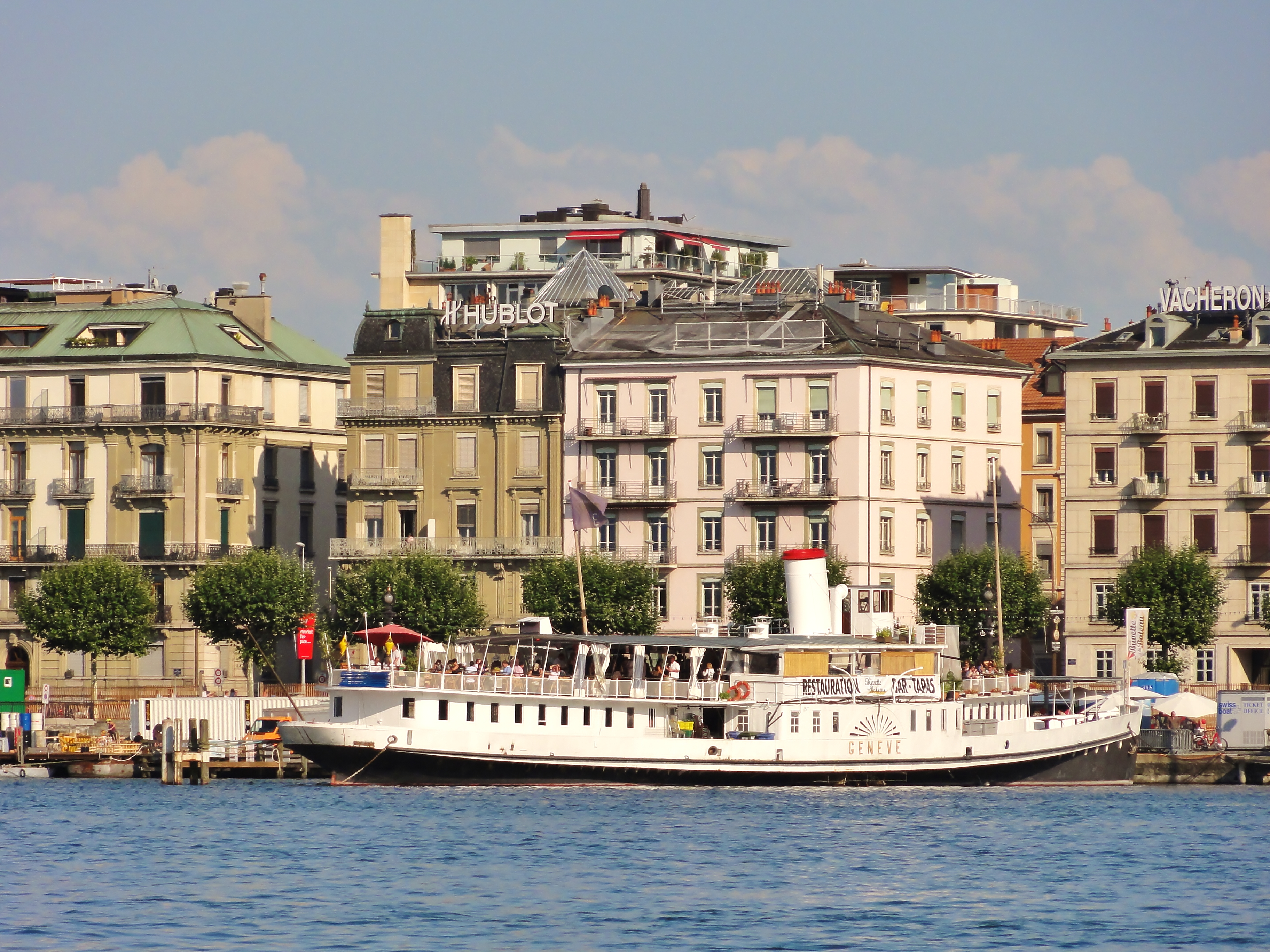 Le Bateau Genève actuellement est utilisé comme buvette restaurant au Quai Gustave-Ador du Lac Léman à Genève L’histoire du Bateau Genève (Le Genève, l’impératrice et l’anarchiste) : Le Bateau “Genéve” a été lancé en 1896 à l’occasion de l’exposition nationale qui s’est déroulée à Genève. Son nom lui a été donné à cette occasion. Fleuron de la marine du Léman et premier bateau salon construit par Sulzer, il démontrait au mieux les capacités de l’industrie suisse. Le Bateau « Genève » est entré dans la Grande Histoire à l’occasion de l’assassinat de l’impératrice Elisabeth d’Autriche le 10 septembre 1898. Ce jour là, la populaire « Sissi » va prendre la bateau depuis Genève, où elle résidait incognito à l’Hôtel Beau-Rivage, pour Territet sur la riviera vaudoise. Sur le quai, elle est frappée avec un poinçon par un inconnu, qui se révèlera être un anarchiste italien, Luigi Luccheni. Inconsciente de la gravité de sa blessure, elle monte sur le « Genève » qui appareille. L’impératrice s’affaisse, le bateau revient précipitamment à quai et Sissi est transportée sur un brancard jusqu’à l’Hôtel Beau-Rivage où elle rendra le dernier soupir (...)